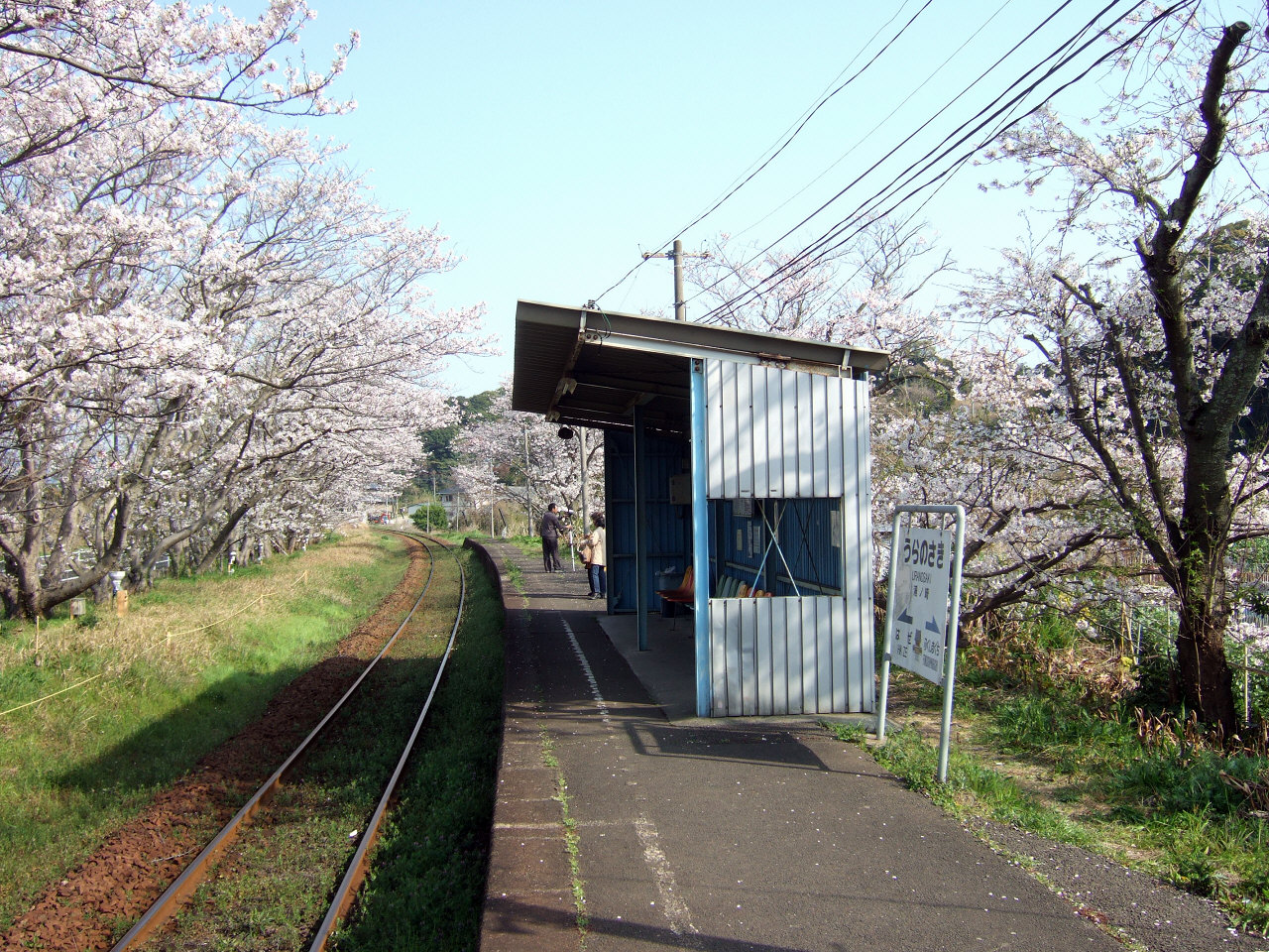 松浦鉄道浦ノ崎駅（Matsuura Railway Uranosaki Station）